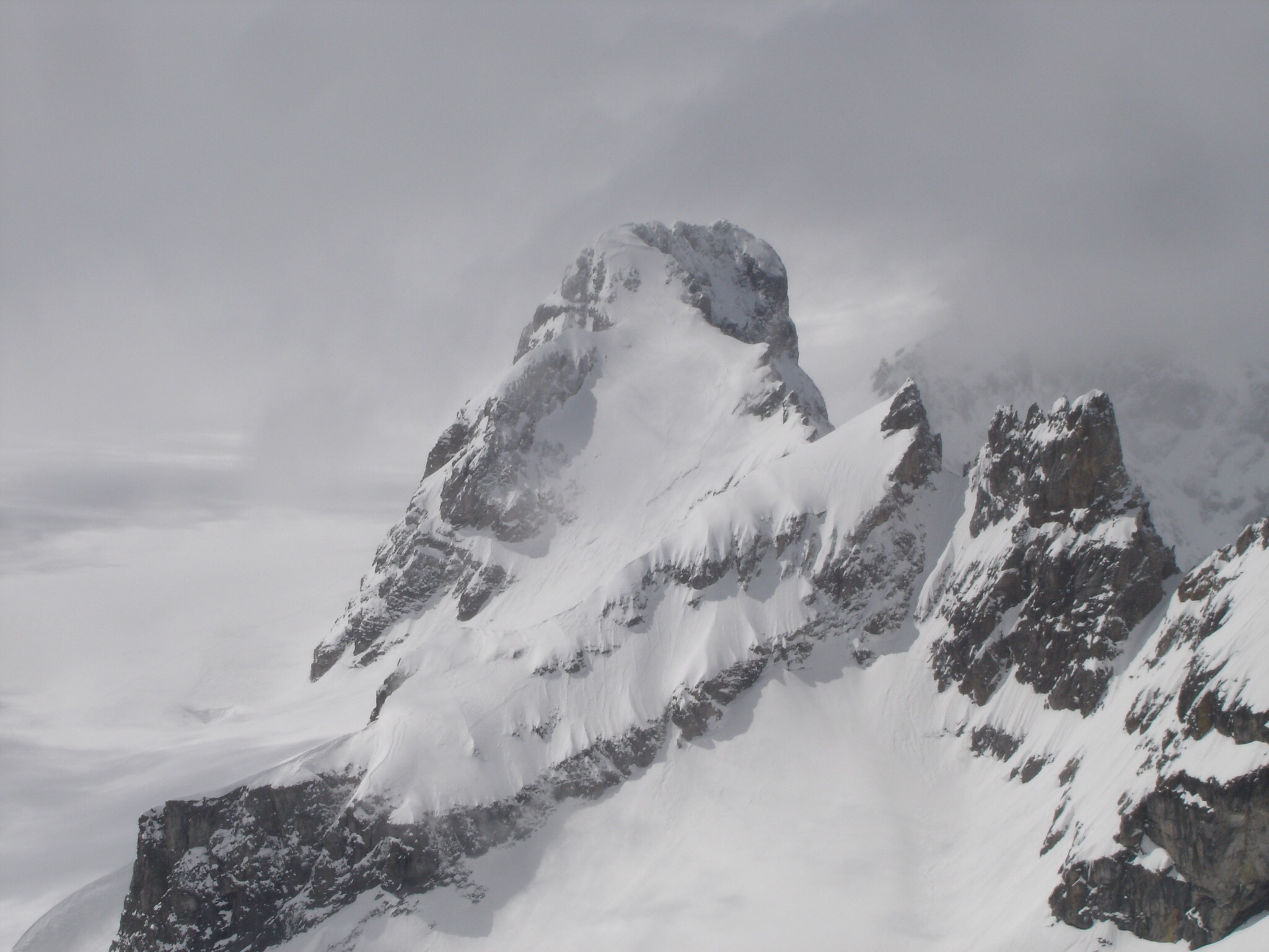 Der Bocktschingel vom Gemsfairenstock